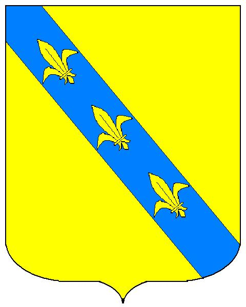 Grb obitelji Lukarić